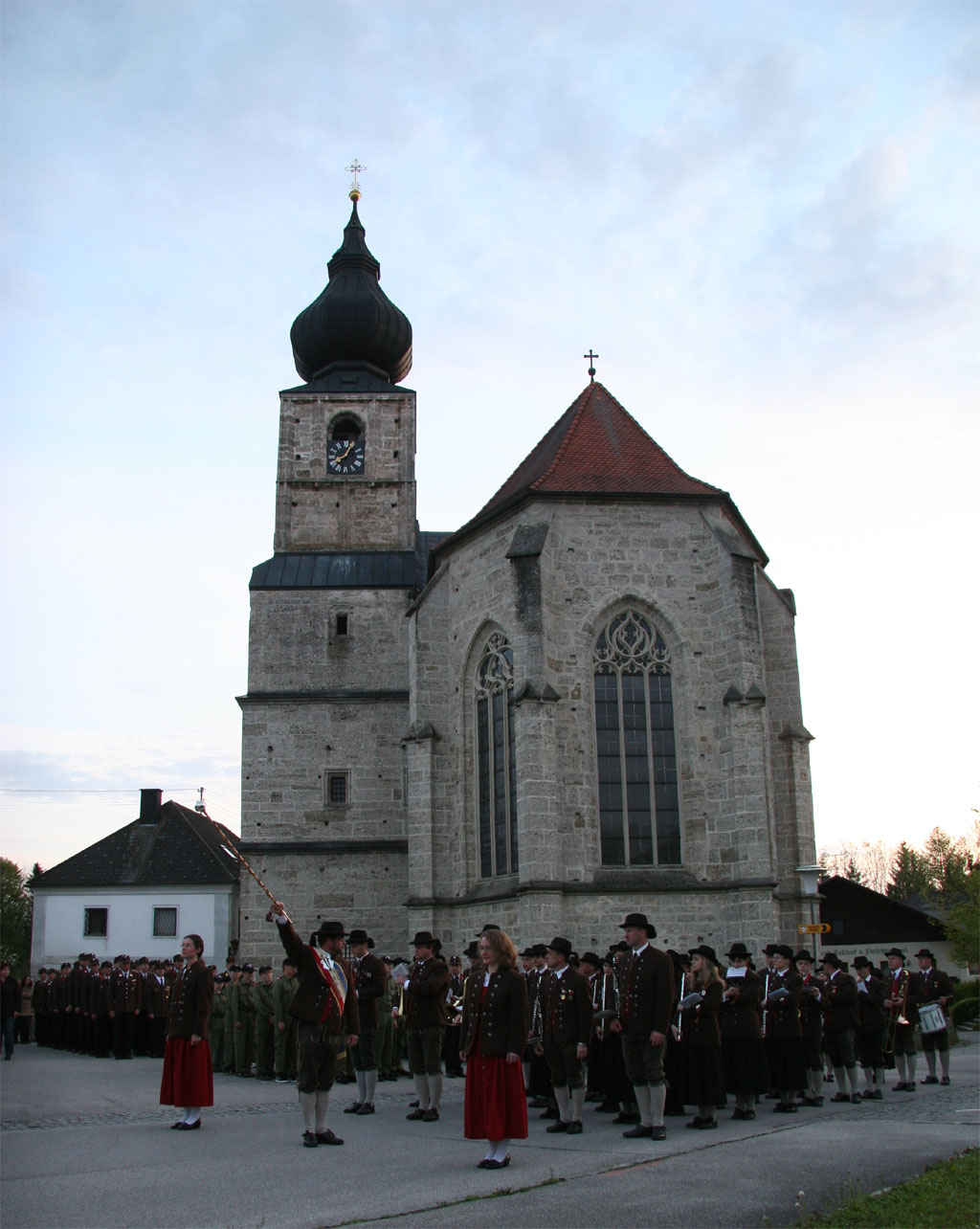 Kirche in Adlwang in Oberösterreich.